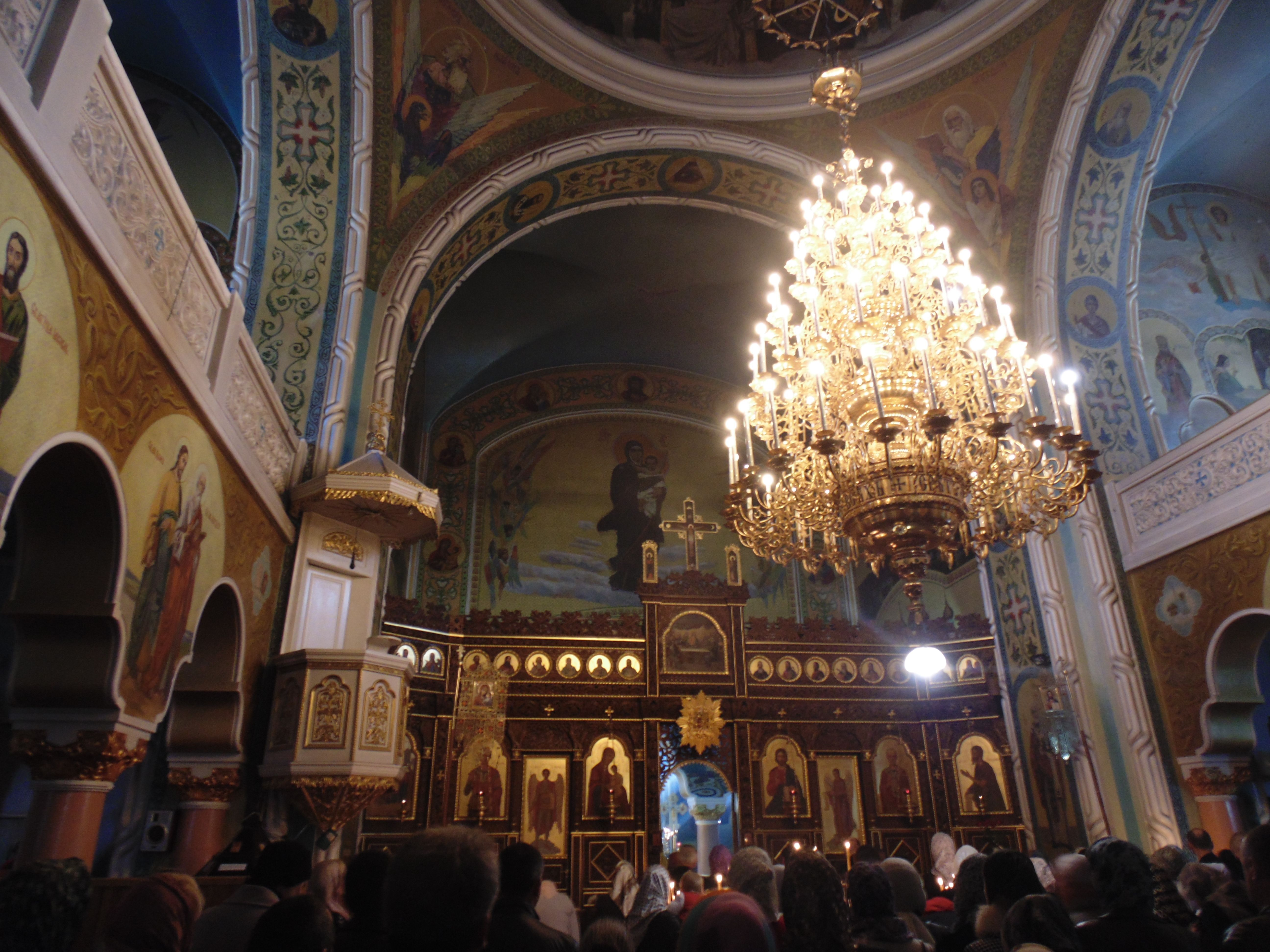 Миколаївський кафедральний собор, Чернівці, Руська, 35